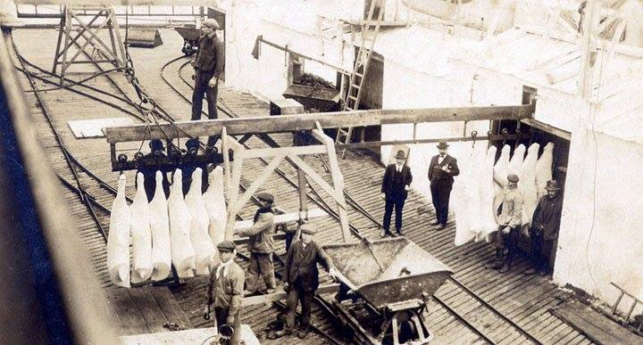 Parecería ser el Frigorífico Terrasson en San Nicolas, Provincia de Buenos Aires (Argentina)